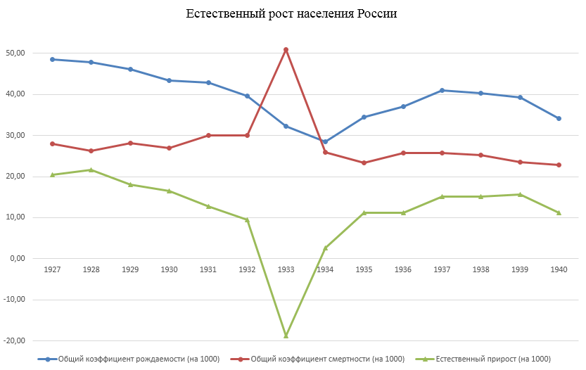 Естественное движение России 1927-1940